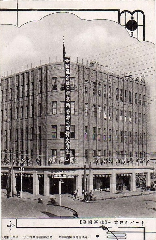 臺灣高雄州高雄市鹽埕町六丁目吉井百貨。